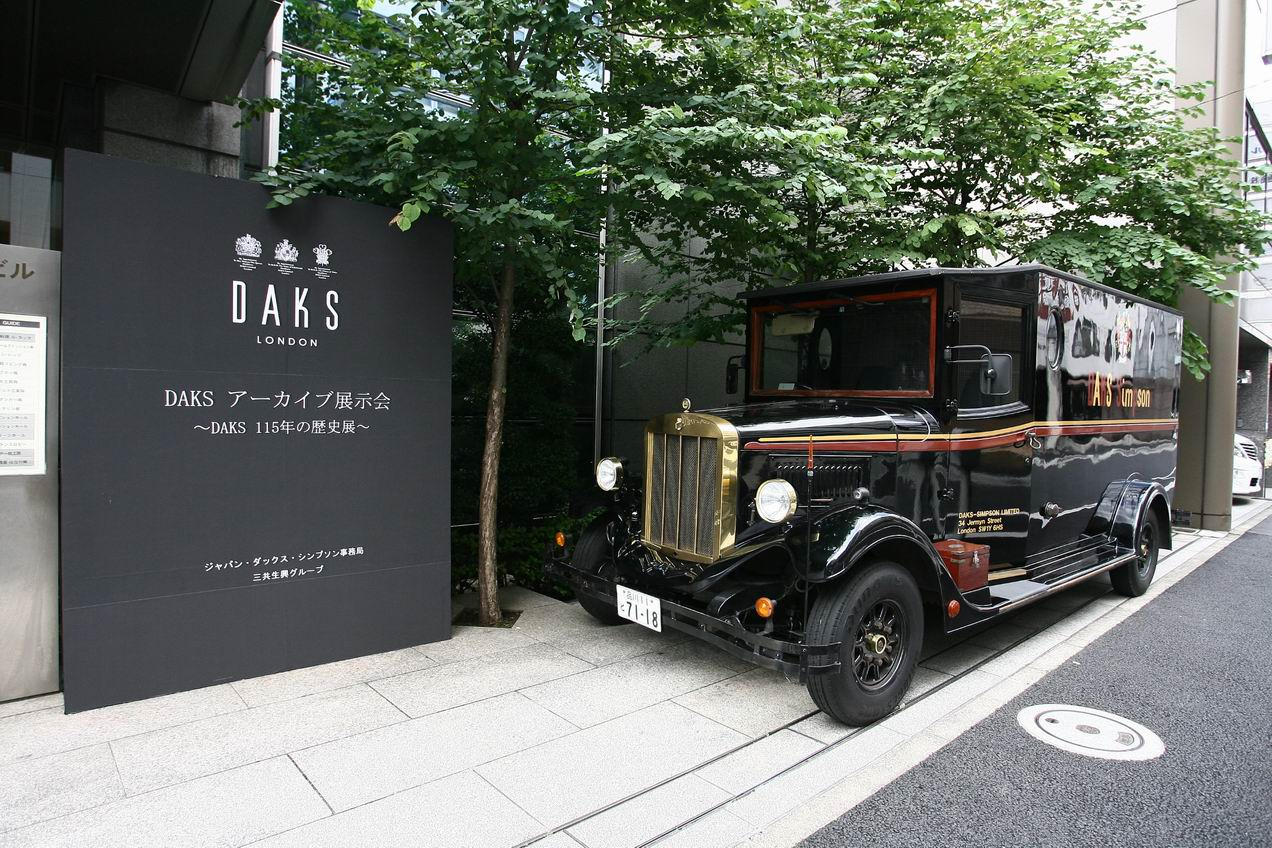 東京都中央区日本橋富沢町11-12, 2009年7月30日